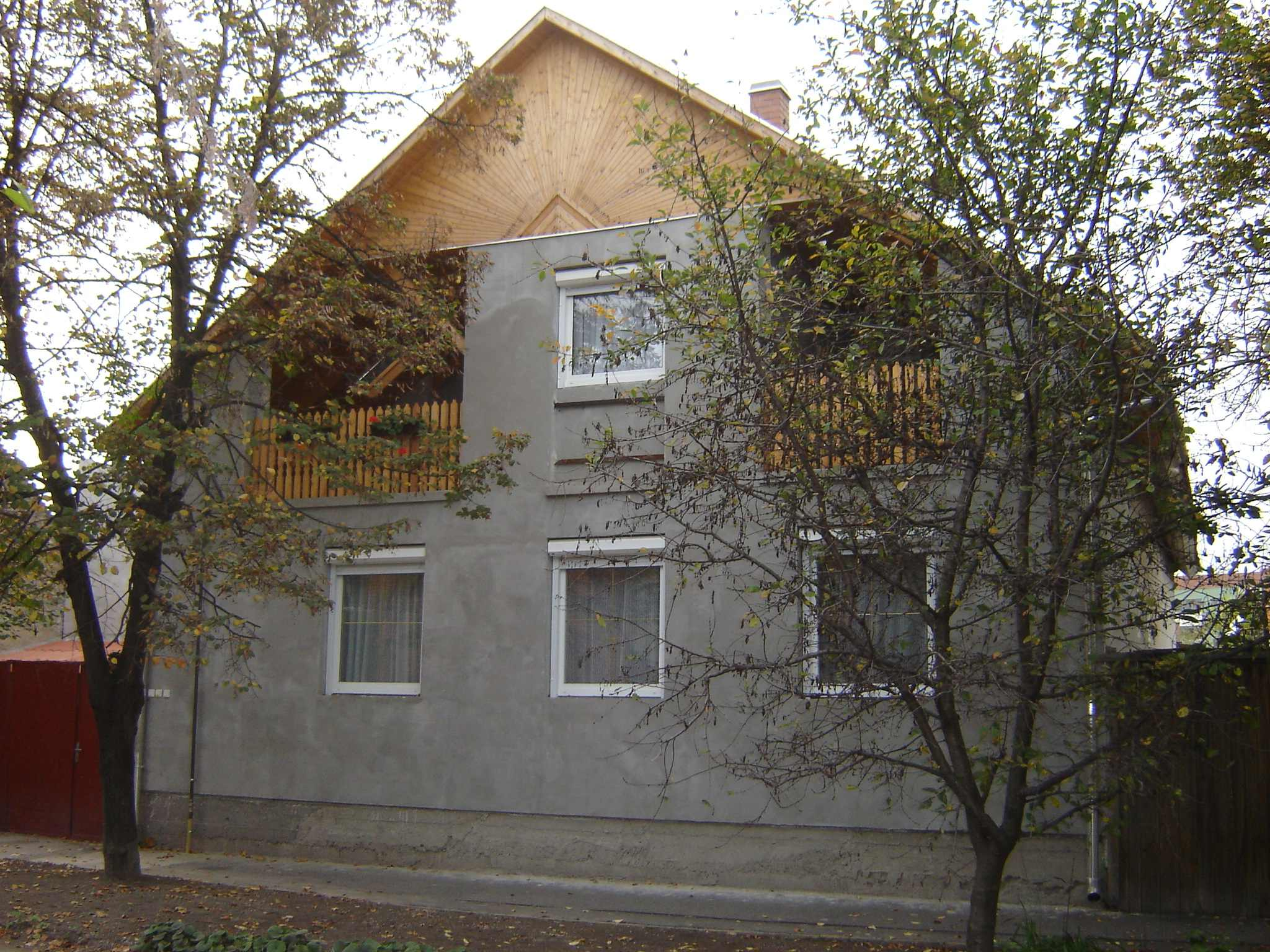 Új napsugaras ház, Szeged-Alsóváros (épült 2002-ben)